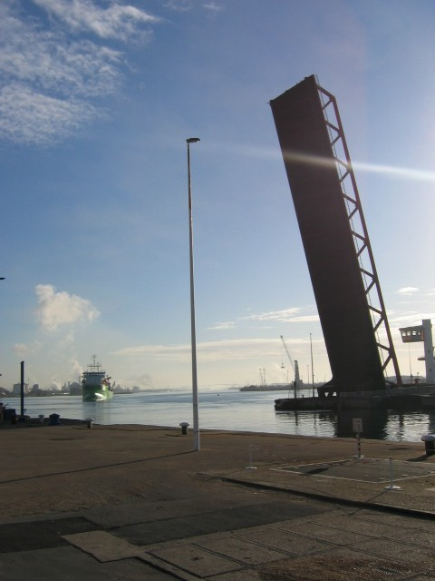 Ecluse François I, Port du Havre, Seine-Maritime ;Le Havre ; source : photographie personnelle de l'Utilisateur Urban, prise en octobre 2004, GFDL. Urban octobre 2004